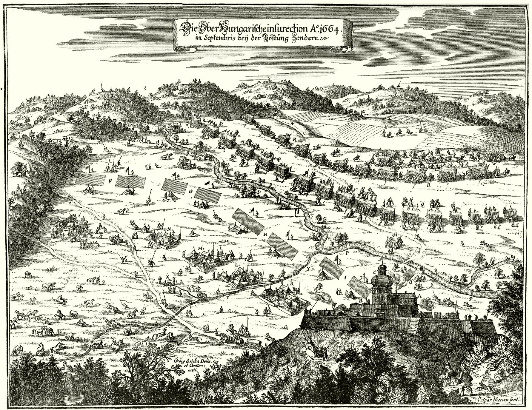 The camp of Szendrő (1664). Szendrői magyar tábor, 1664- A kép alján: Georg(ius) Szicha Delín(eavit) et com(m)unicavit. Caspar Merian fecit. A Lanfranconi-gyűjteménynek az országos képtárban levő példányáról